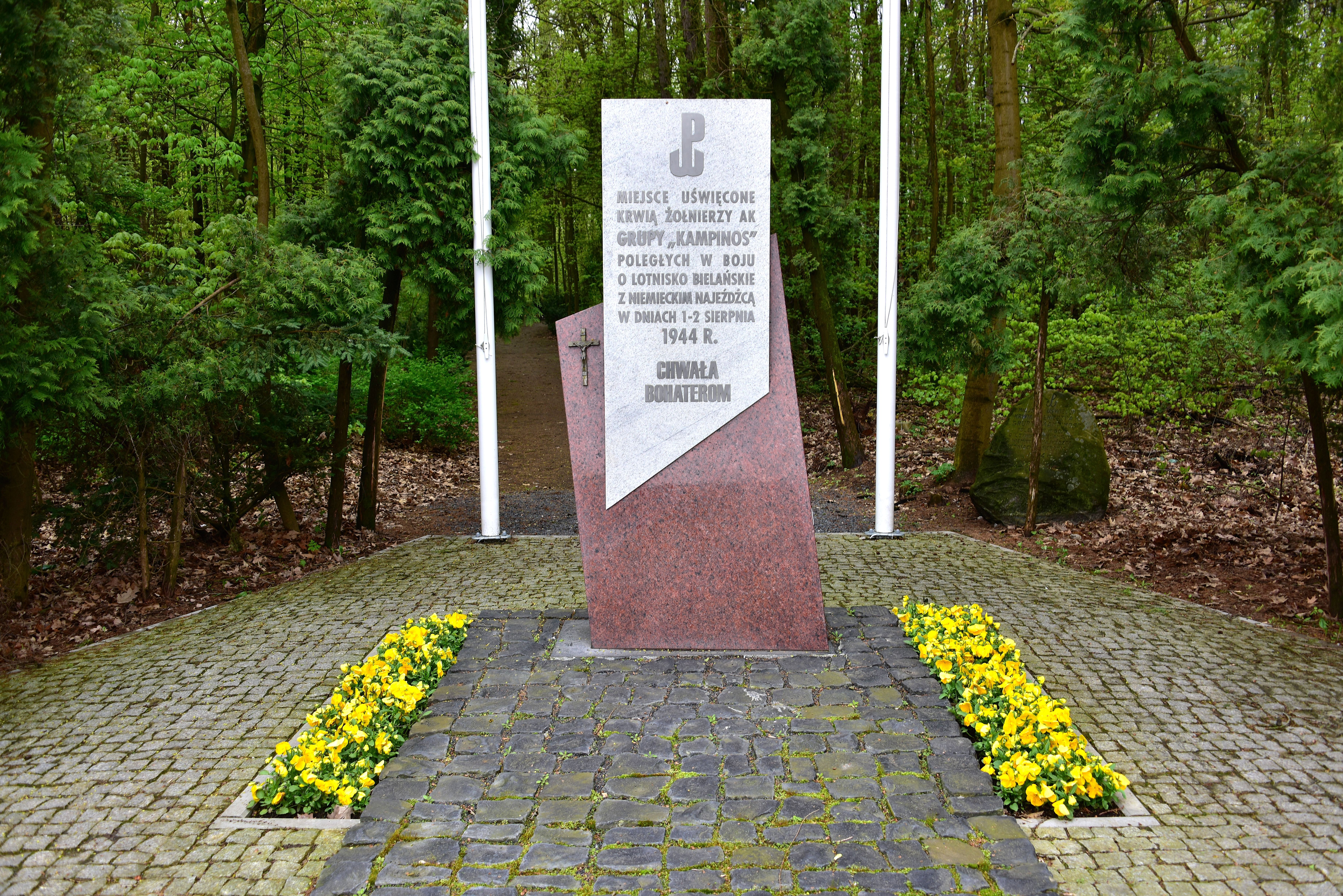 Upamiętnienie żołnierzy Armii Krajowej poległych podczas ataku na lotnisko bielańskie przy ul. Michaliny w Warszawie